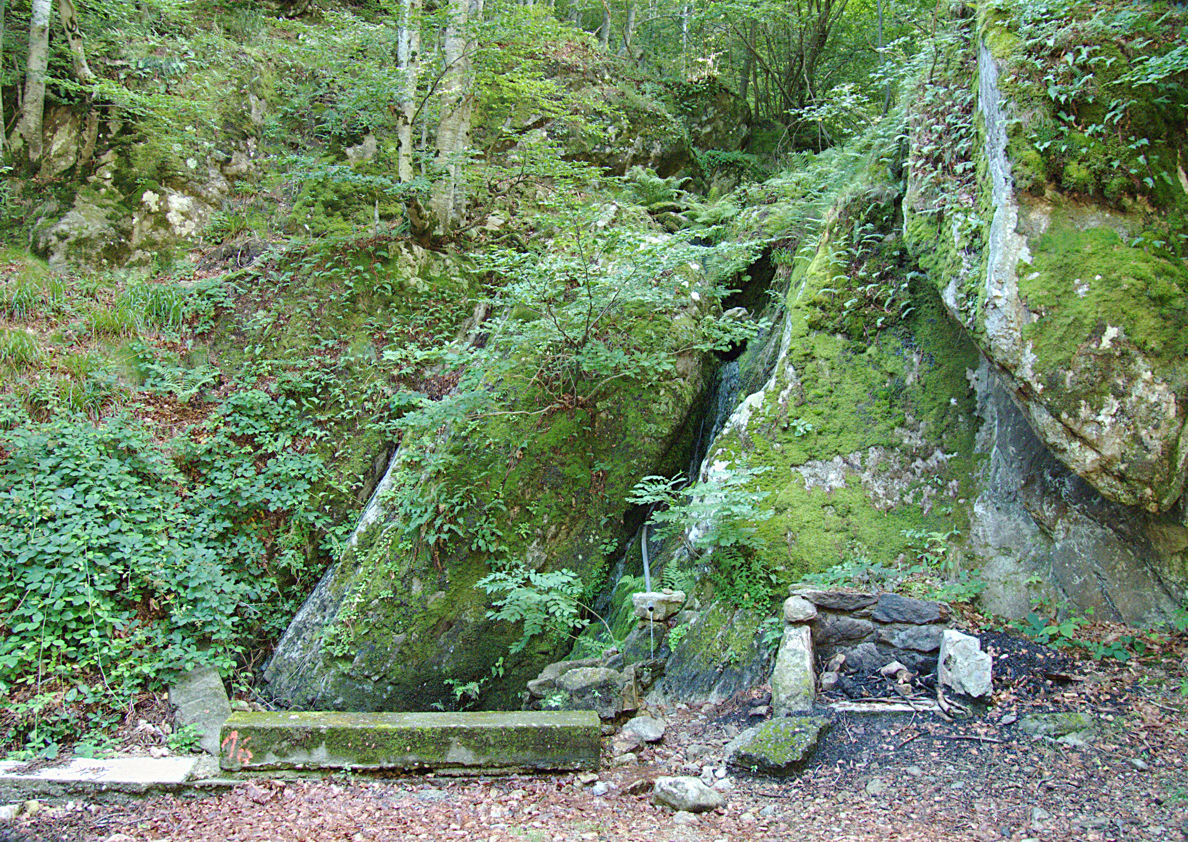 Ru et cascade du Bois de la Comtesse, Céret (Pyrénées-Orientales, Languedoc-Roussillon, France)